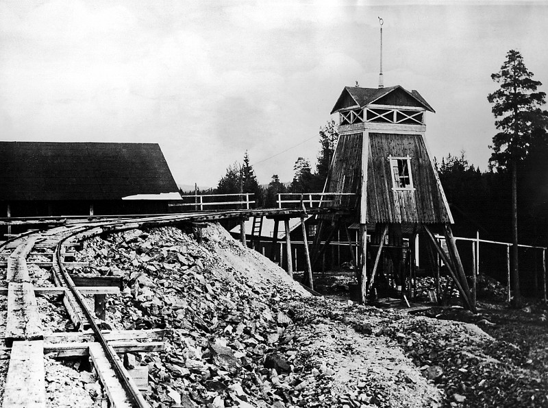 Storstrecksgruvan, Torsåkers socken (Hofors kommun) 1939